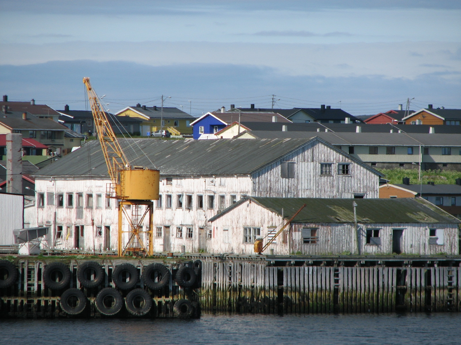 Gammelt fiskebruk